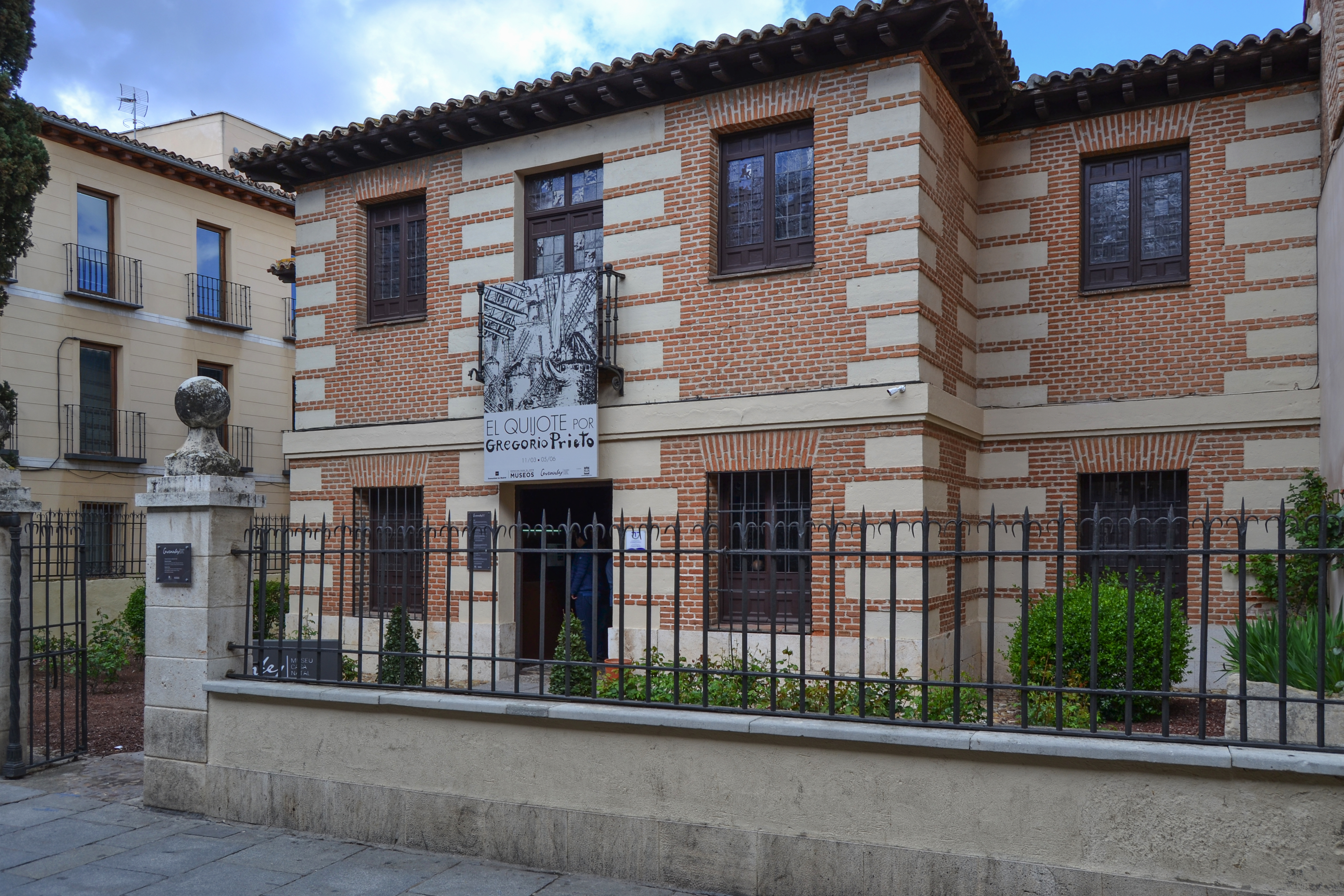 Casa natal de Miguel de Cervantes, Alcalá de Henares, España